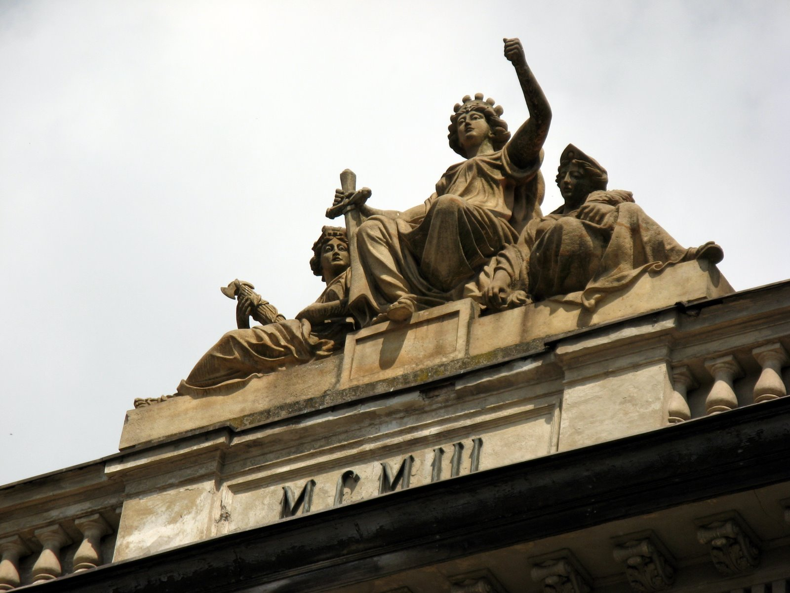 Priečelie budovy rektorátu UPJŠ v Košiciach